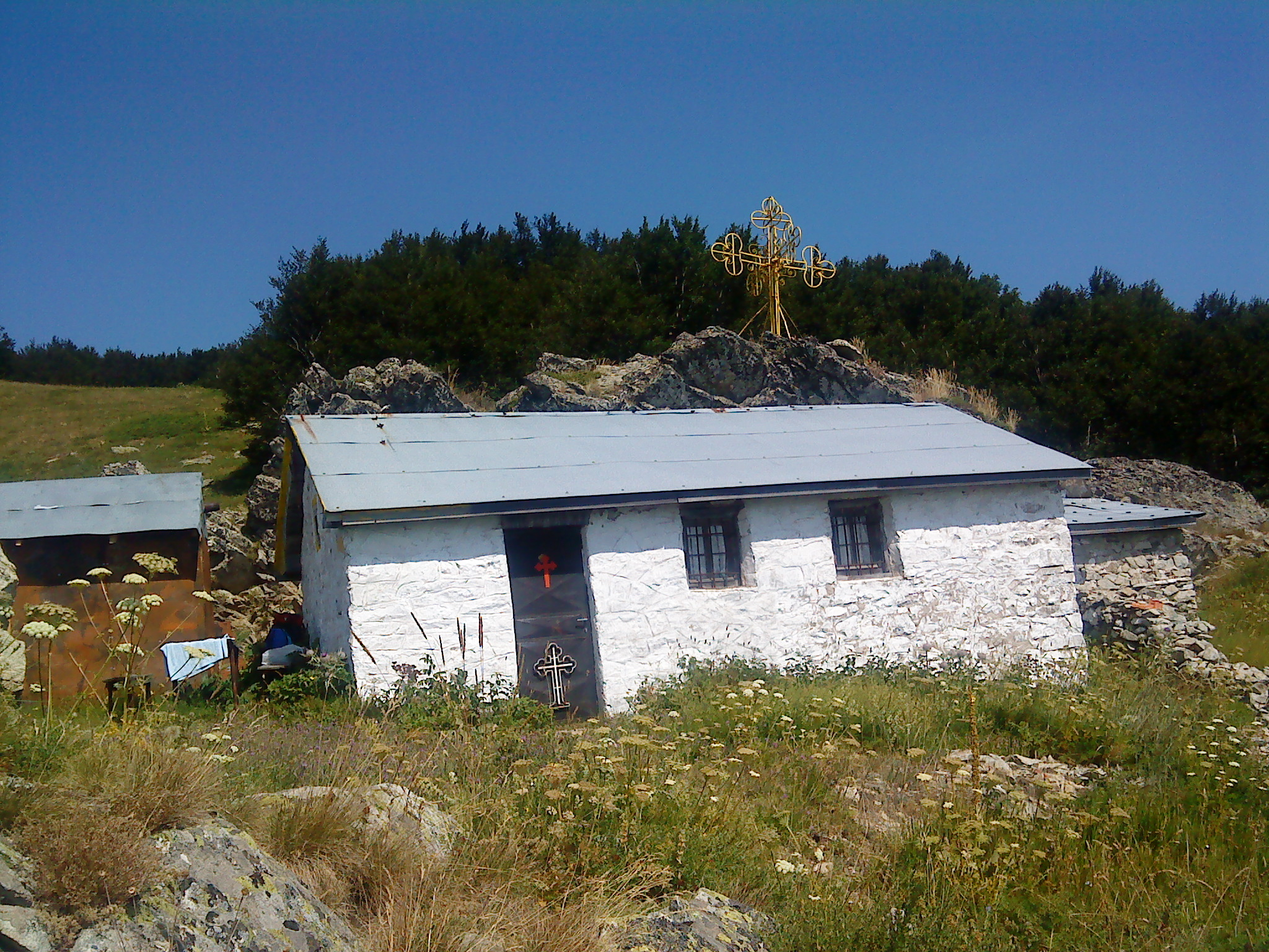 црква Св.Спас -Cвето Вознесение господово, н,в 2000 Вртешка село Маловиште